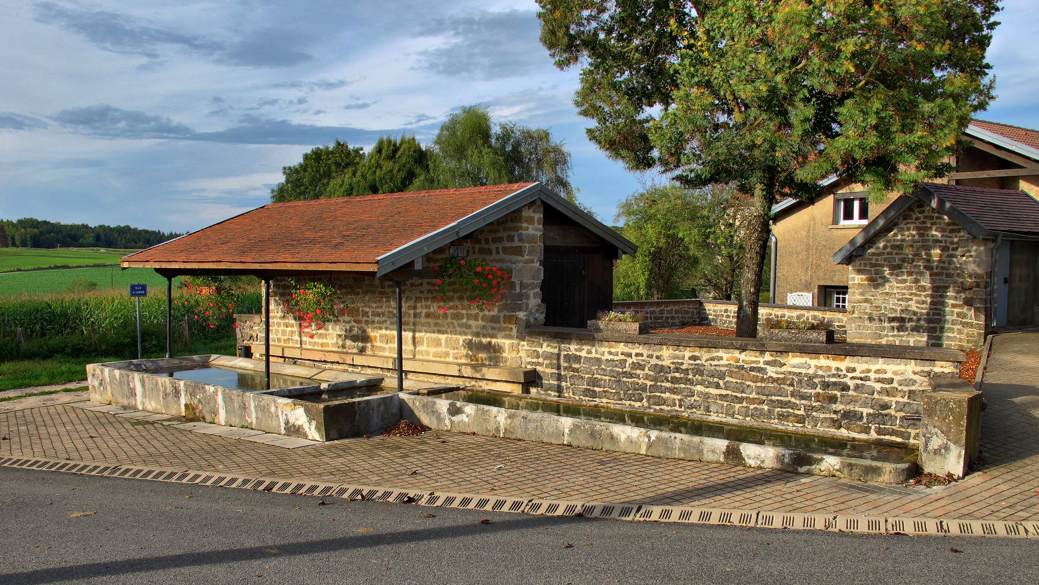 Le lavoir-abreuvoir de Champvans-les-Moulins